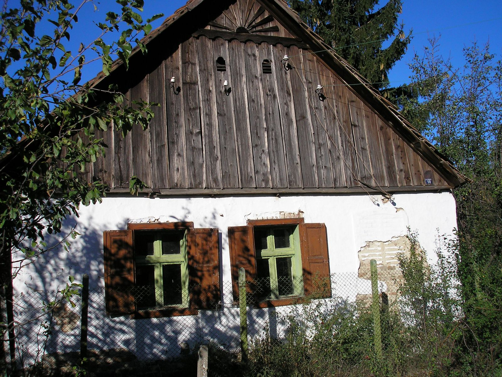 House in Bardarski Geran